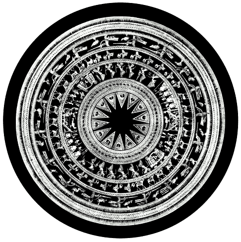 Trống đồng Ngọc Lũ